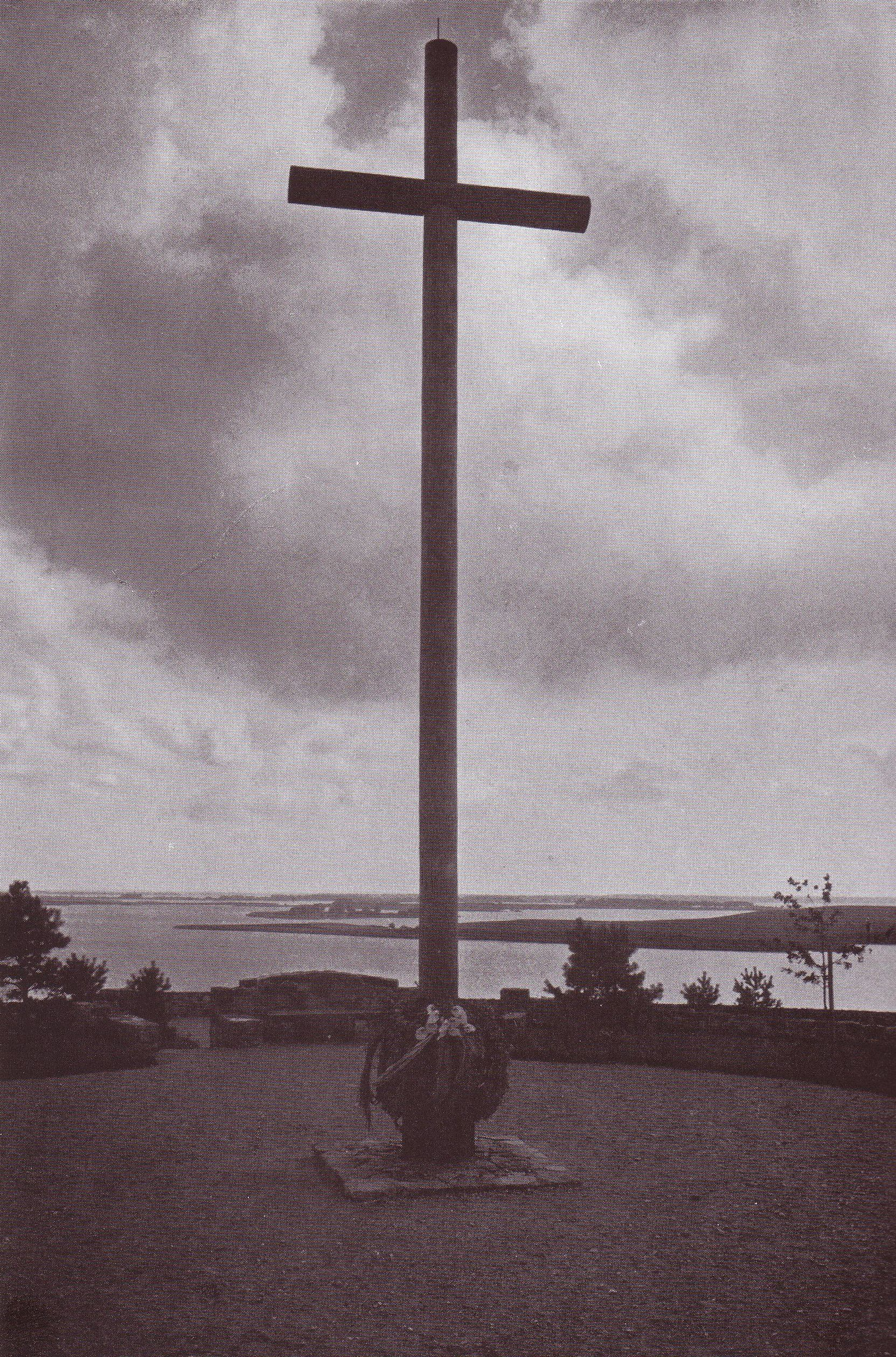 Das Ostlandkreuz auf dem Heldenfriedhof Jägerhöhe (Angerburg)